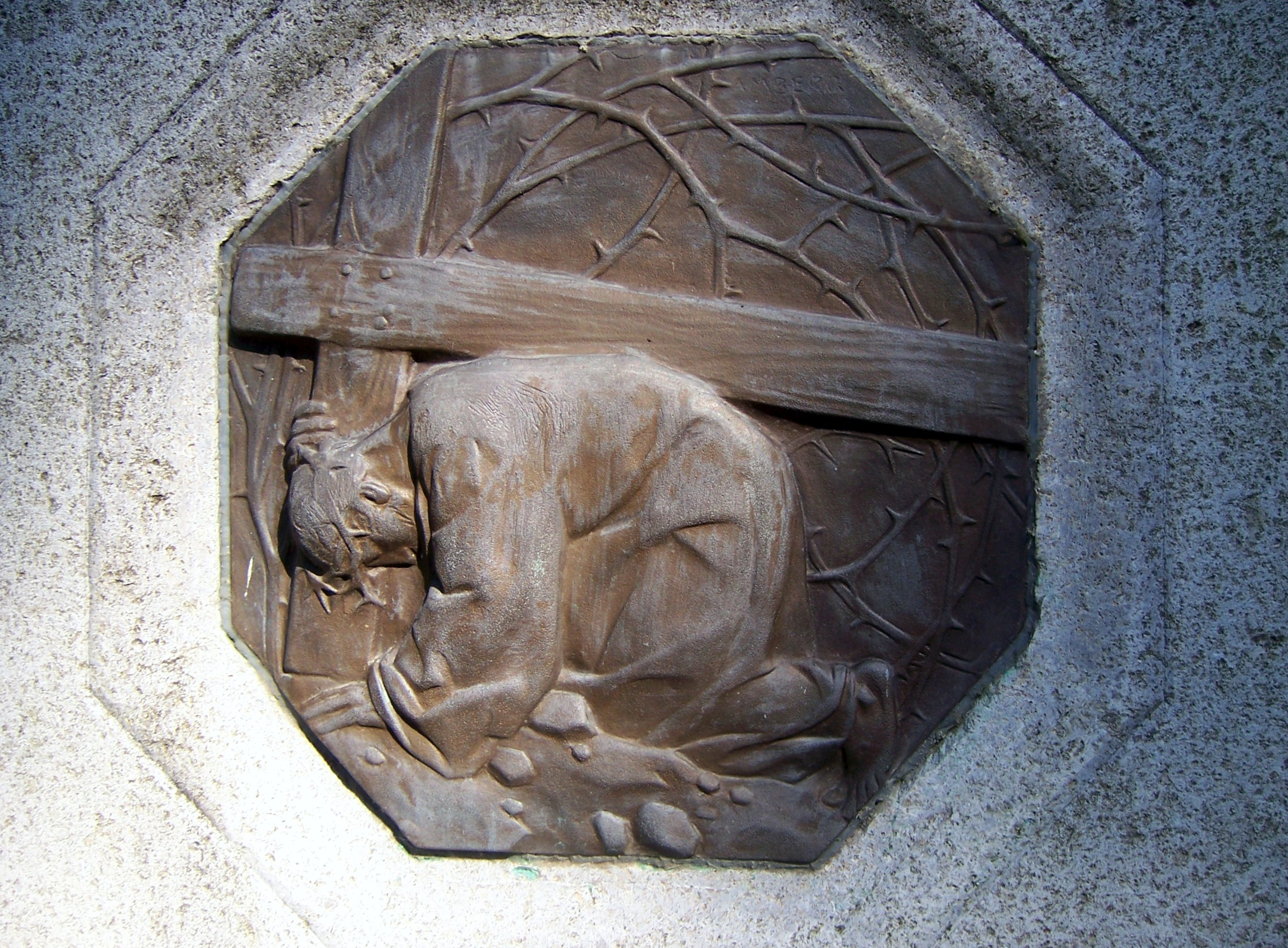 Adolph Amberg: Christus unter dem Kreuz, Kupferrelief, Südfriedhof Leipzig